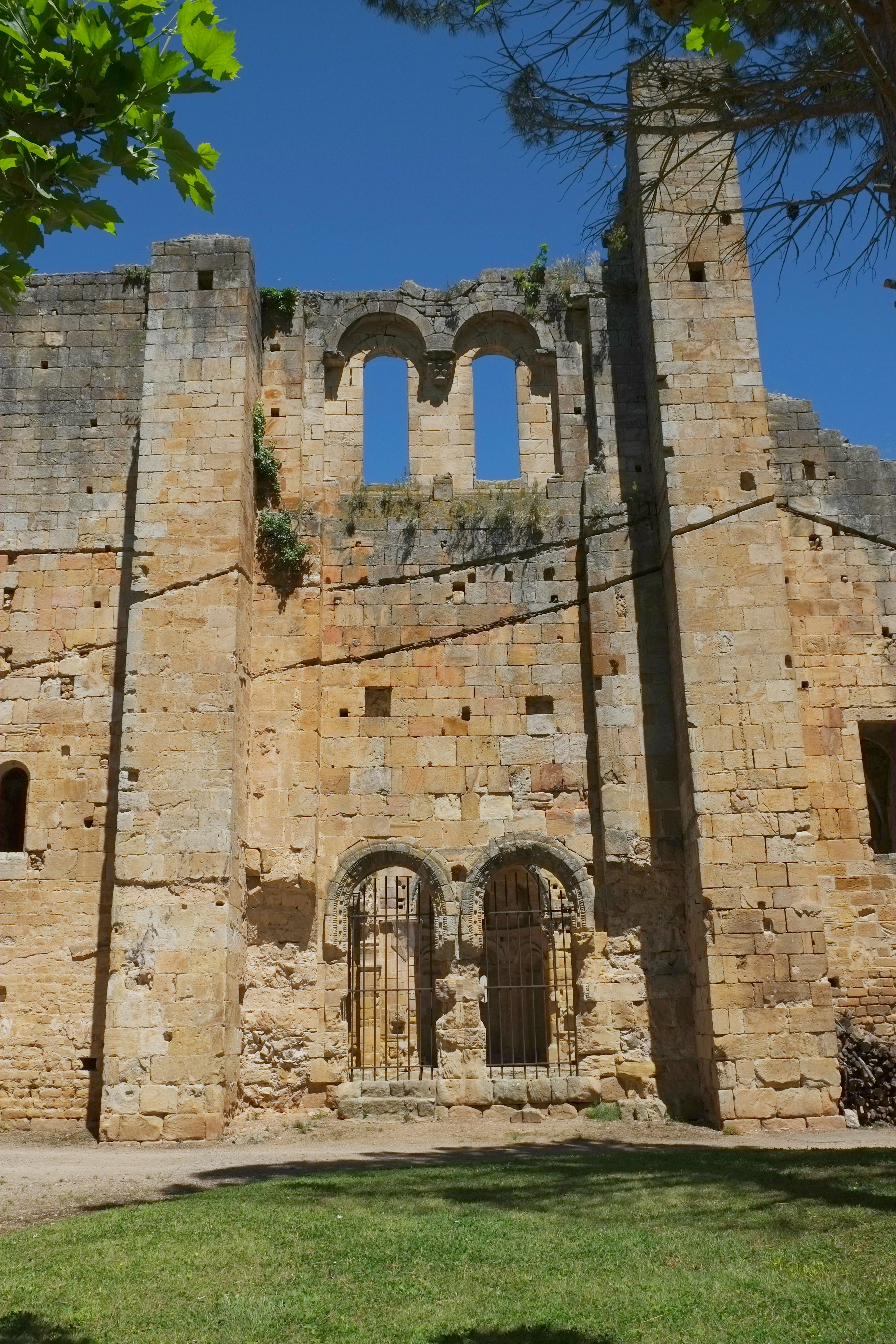 Ehemalige Abtei in Alet-les-Bains (Frankreich)